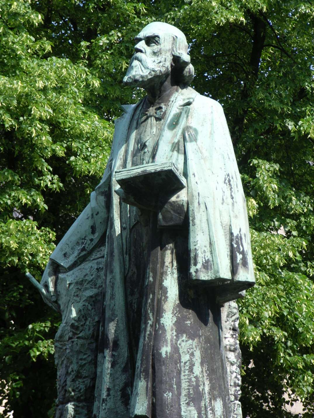 Pierre Cuypers statue, Roermond